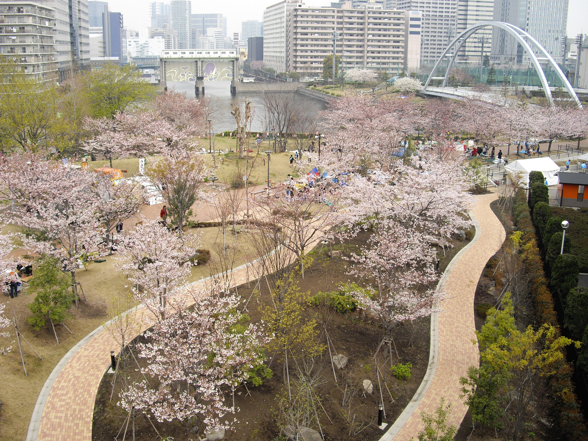 品川区立東品川海上公園2009SP-1